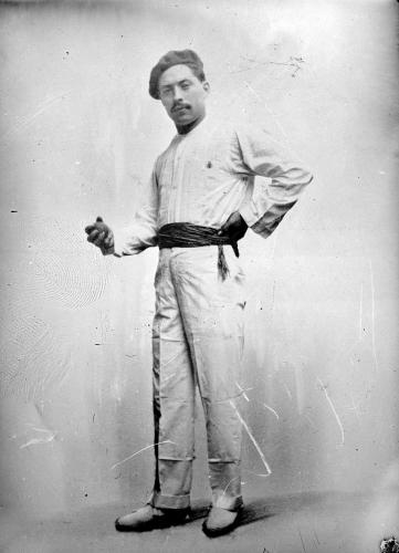 Zapaterito de Lekeitio (Valentín Castellanos) in 1921